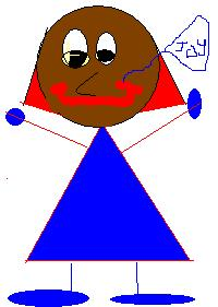 Morrison Made it